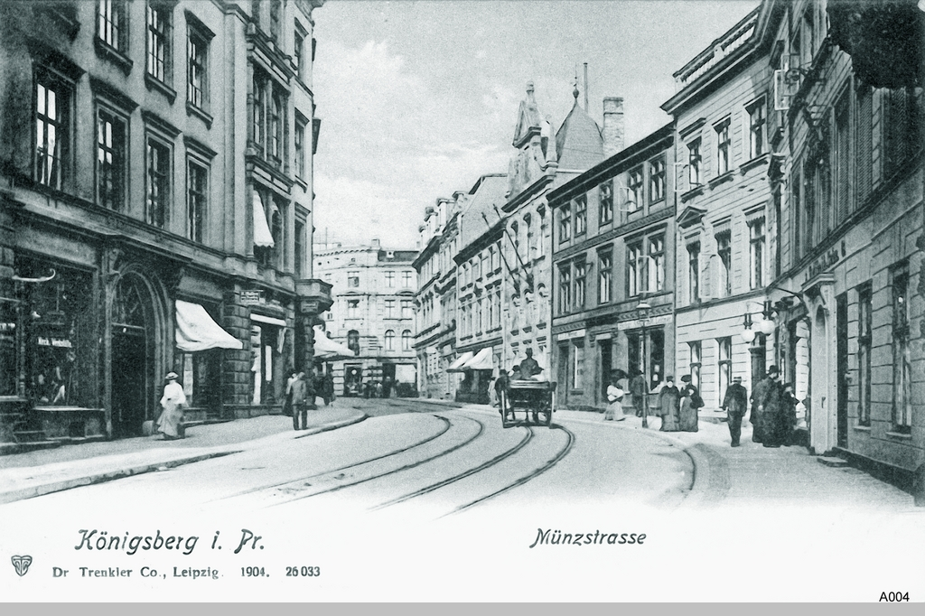 Königsberg